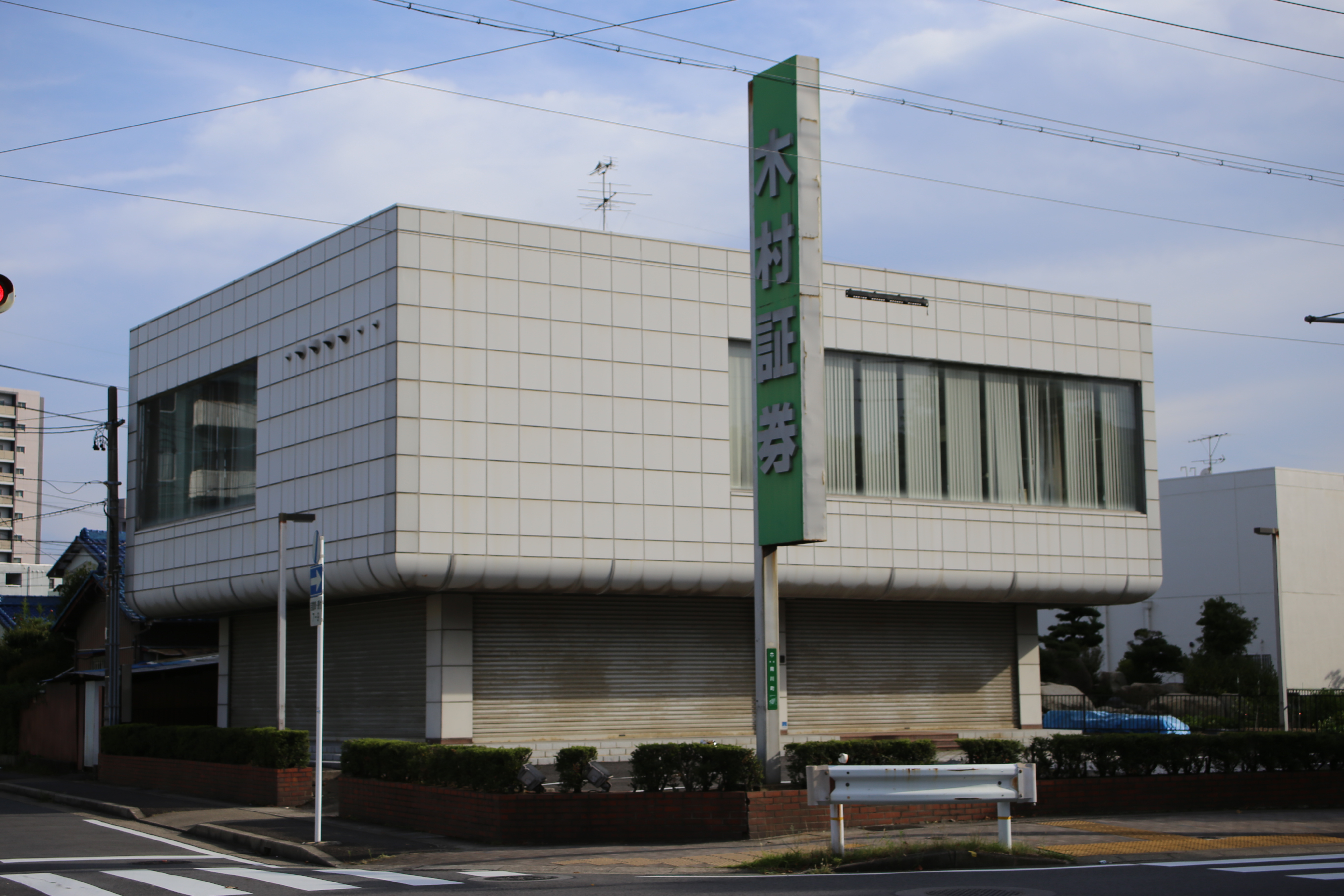 名古屋市西区南川町の木村証券小田井支店